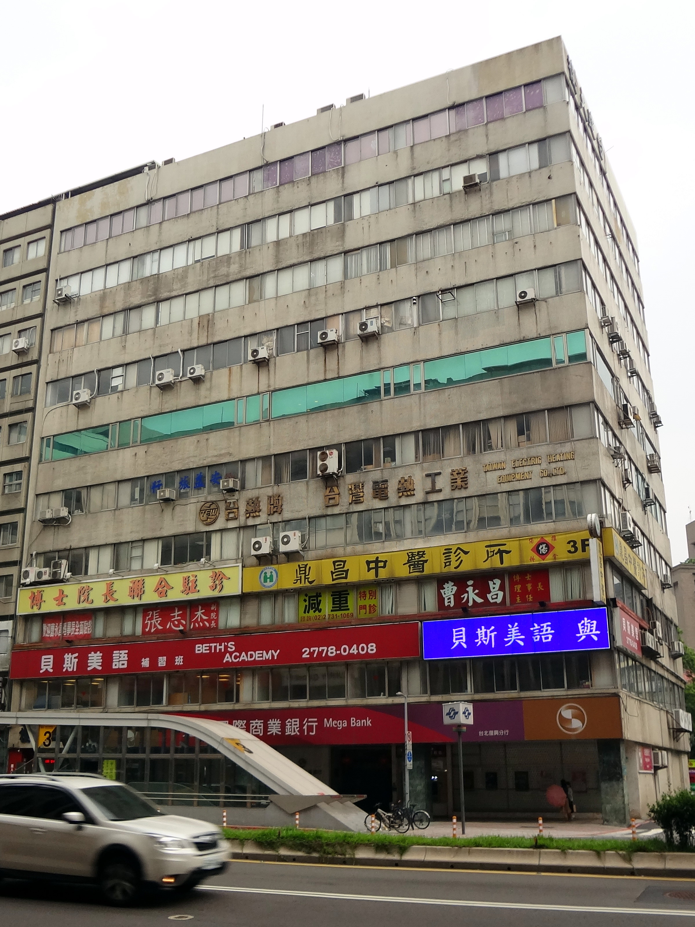 台建大樓，位於台北市中山區南京東路三段198、200號，198號1樓是兆豐國際商業銀行台北復興分行，200號4樓是原台灣電熱工業總部。